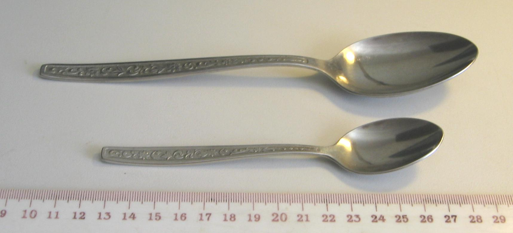 Kuleroj: normala (supre) kaj tea (malsupre). Mi, aŭtoro de la bildo, permesas al ĉiuj uzi ĝin kun ĉi tiaj kondiĉoj